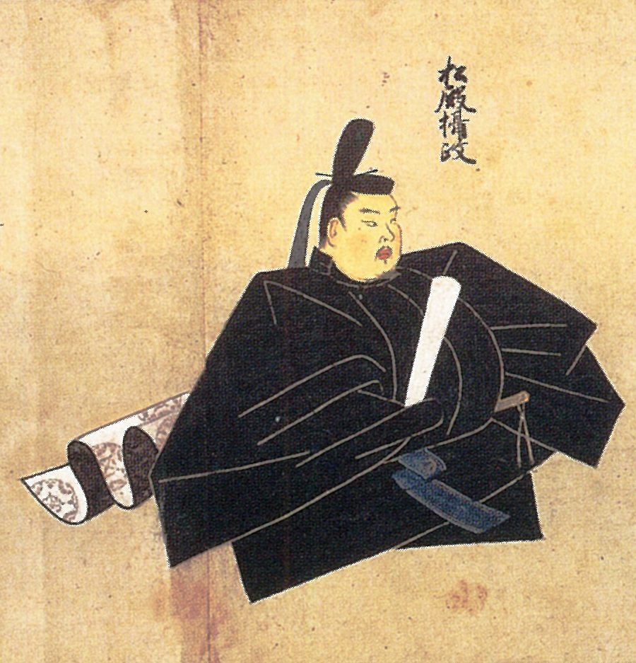 松殿師家の肖像画。